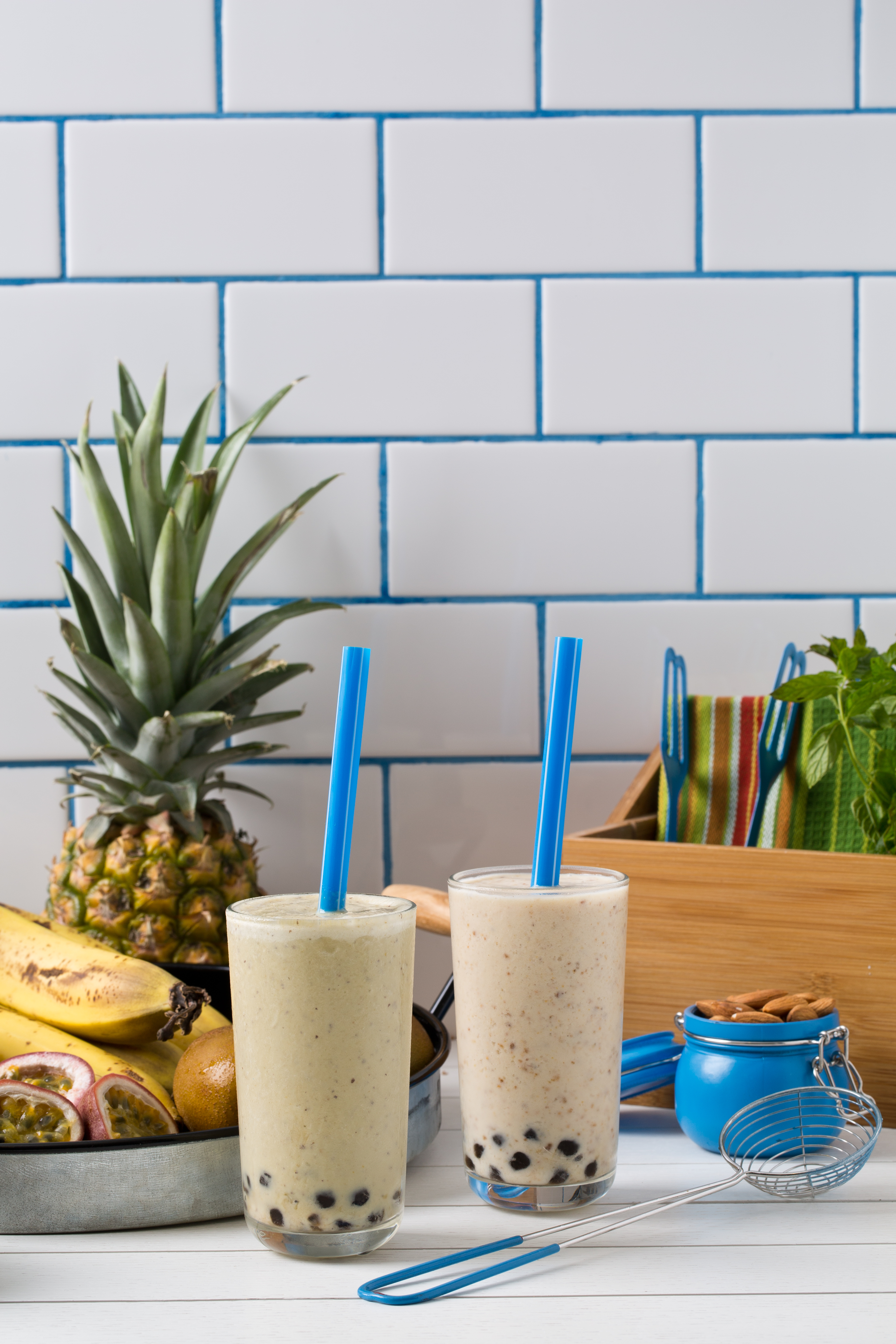 משקה עם כדורי טפיוקה